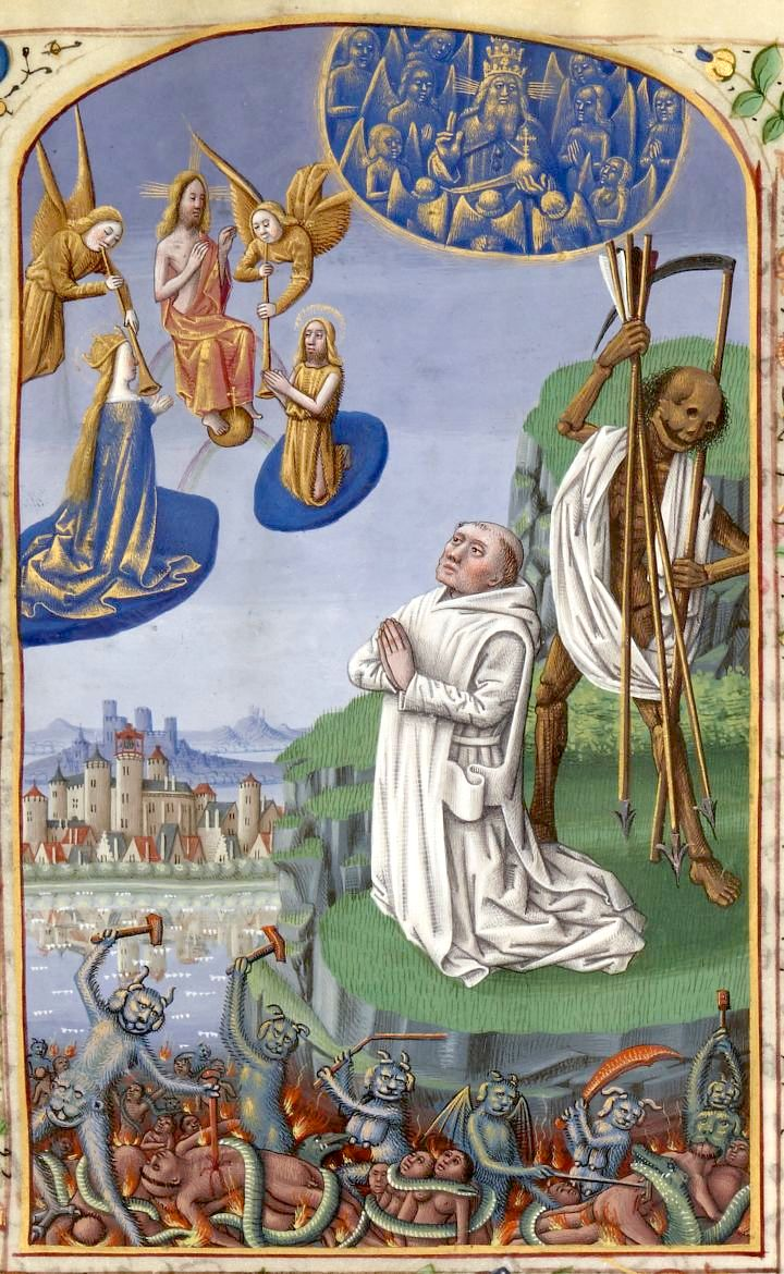 Lamentations de saint Bernard Fol. 13r (détail)